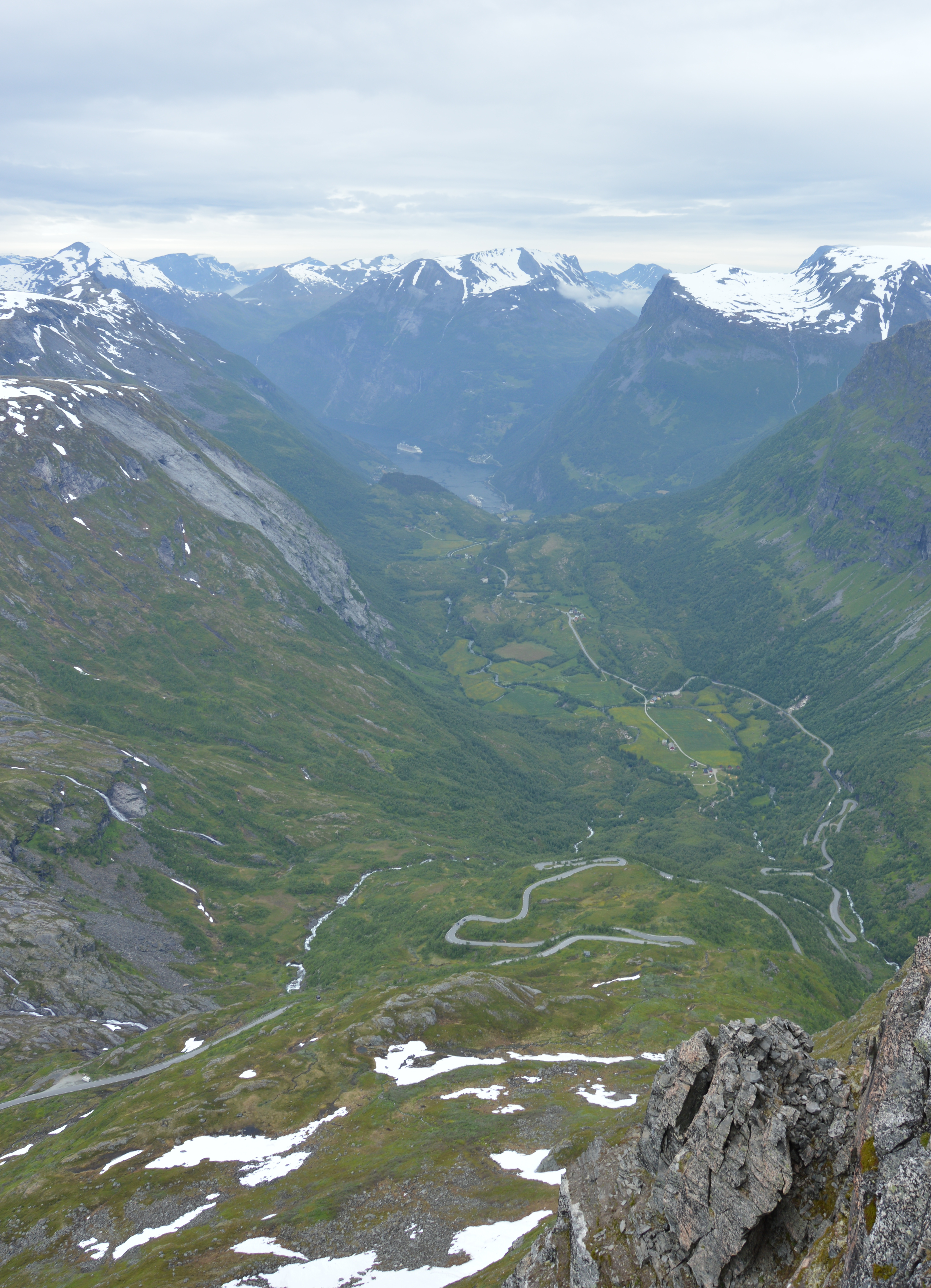 Geirangerstraße